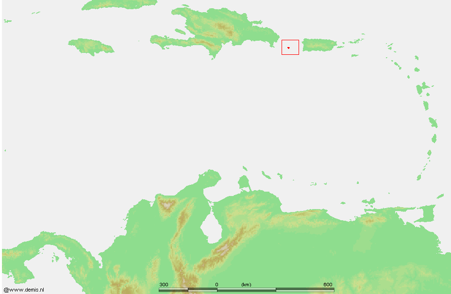 Caribbean - Isla Mona.PNG